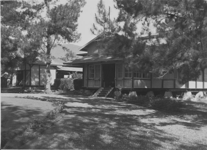 Foto. De controleurswoning van H.H. Morison en P.A. Morison-Noordermeer in Kerintji